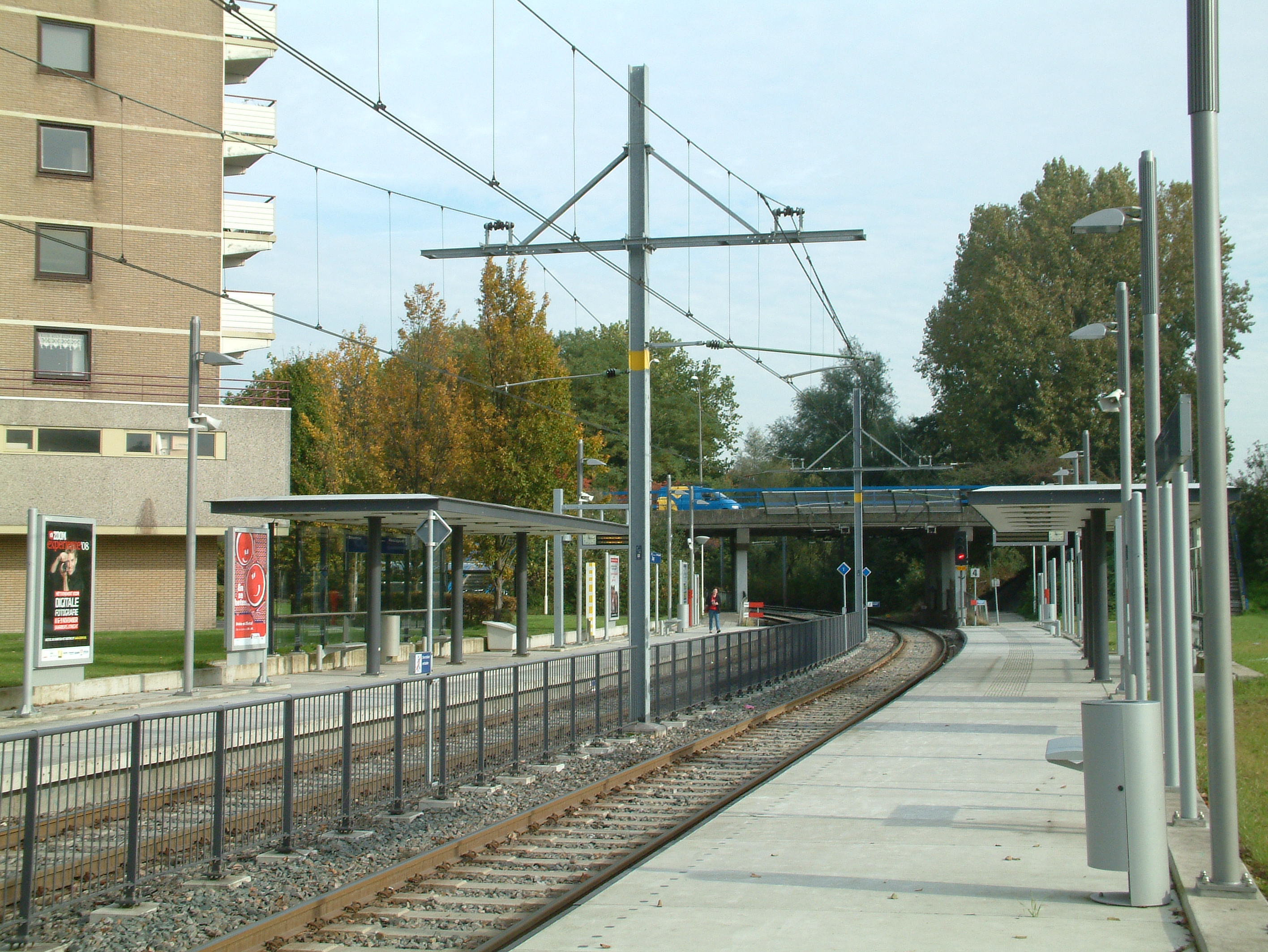 Station Dorp in Zoetermeer